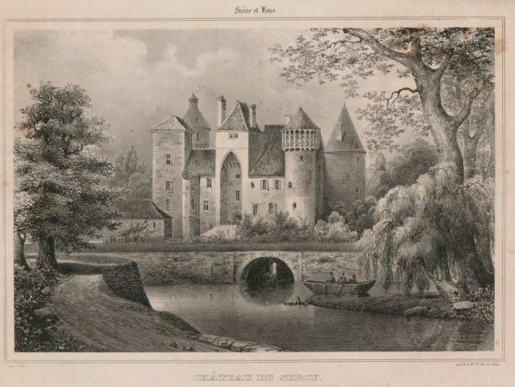 Dessin dans voyage pittoresque en Bourgogne ou Description historique et vues des monuments antiques, modernes et du Moyen âge.... Partie 2 / [sous la direction de Charles-Hippolyte Maillard de Chambure, Gabriel Peignot et Boudot] Éditeur : impr. Vve Brugnot (Dijon) Éditeur : impr. Vve Jobard, 1833-1835 (Grenoble)